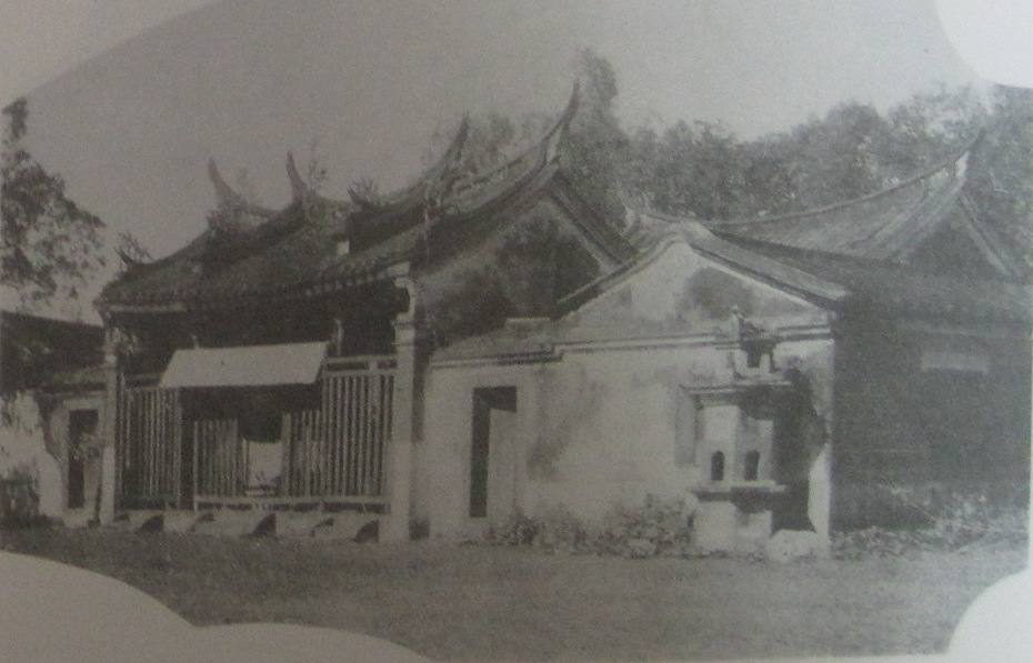 1933年前的永康二王廟